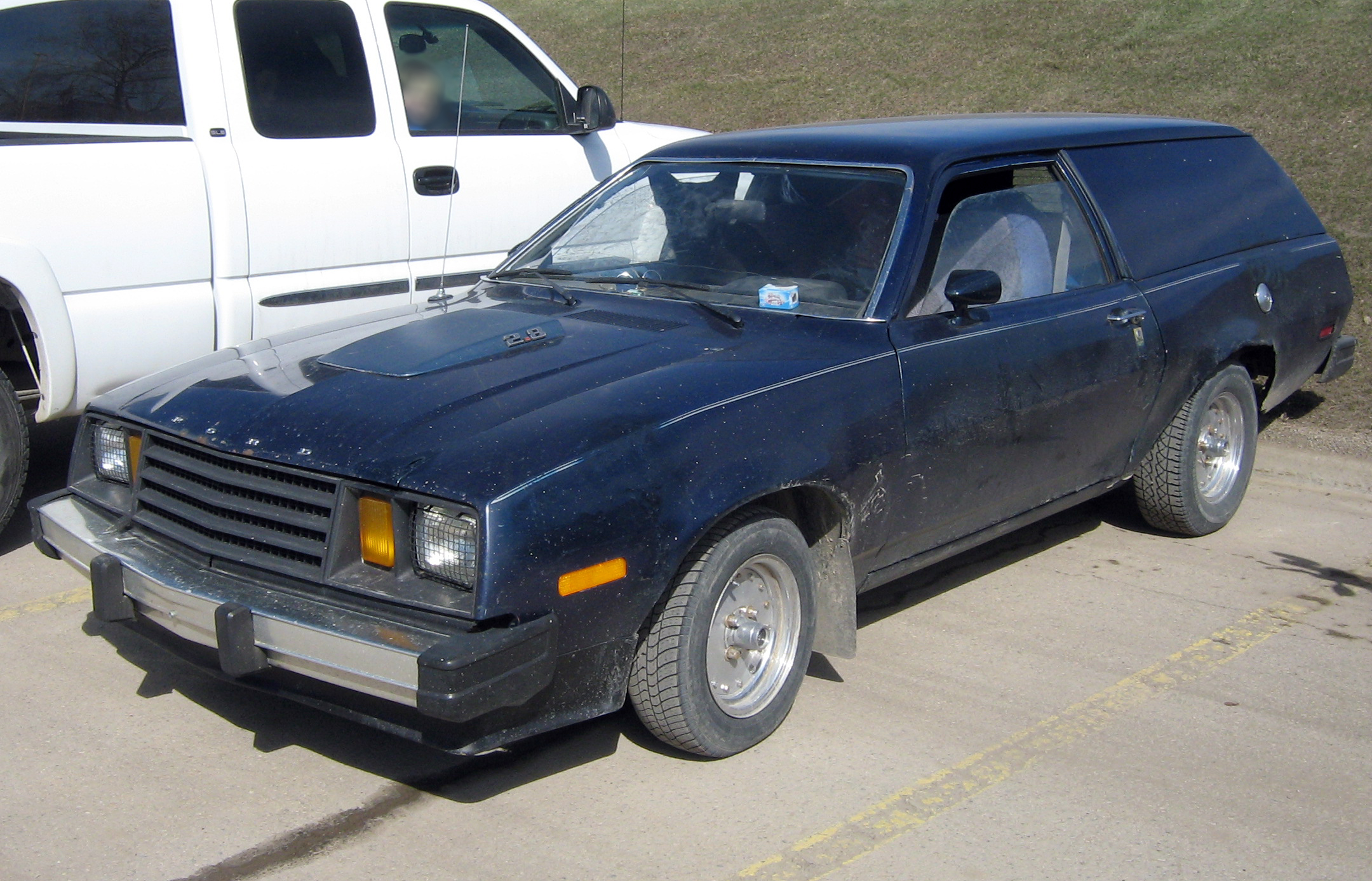 Ford Pinto V6